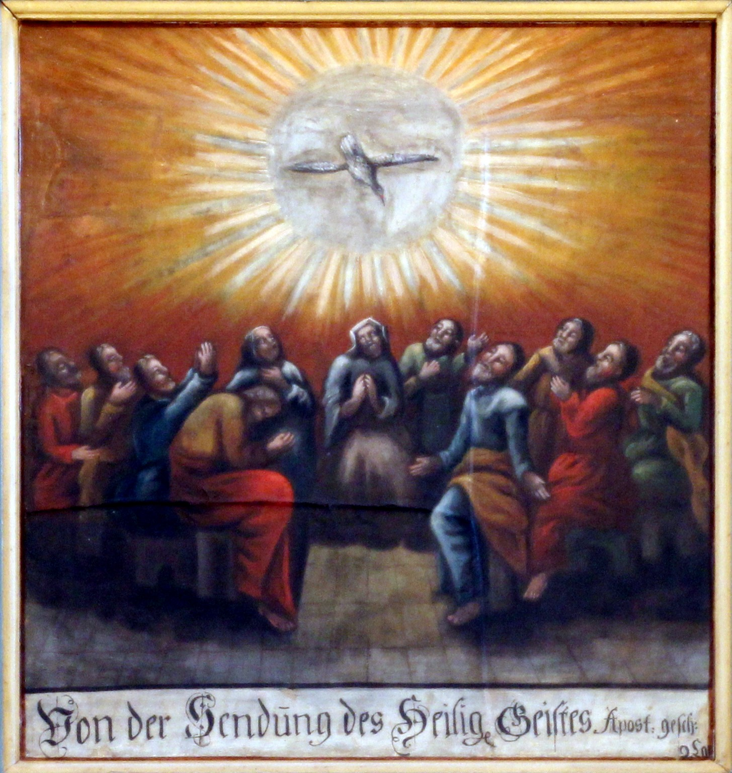 Emporenbilder von Daniel Hisgen in der Evangelischen Kirche Odenhausen (Lahn), Landkreis Gießen, Hessen, Deutschland